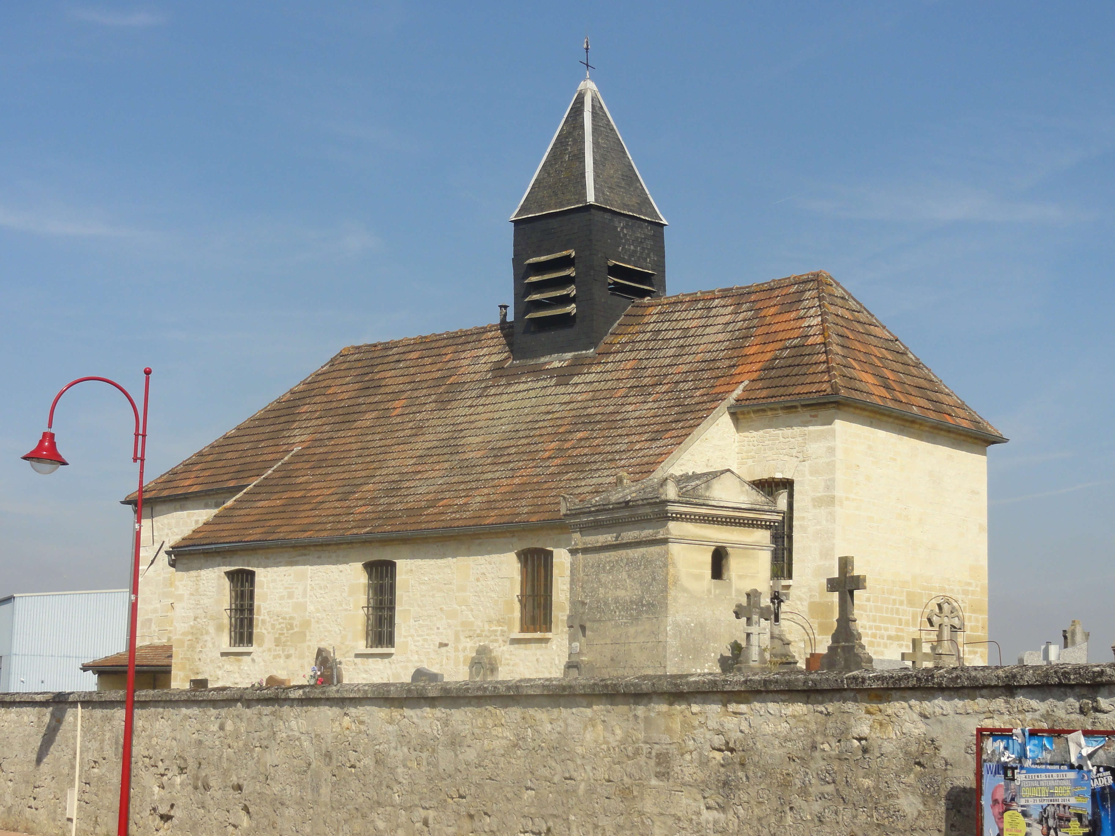 Église Saint-Martin de Saint-Martin-Longueau.